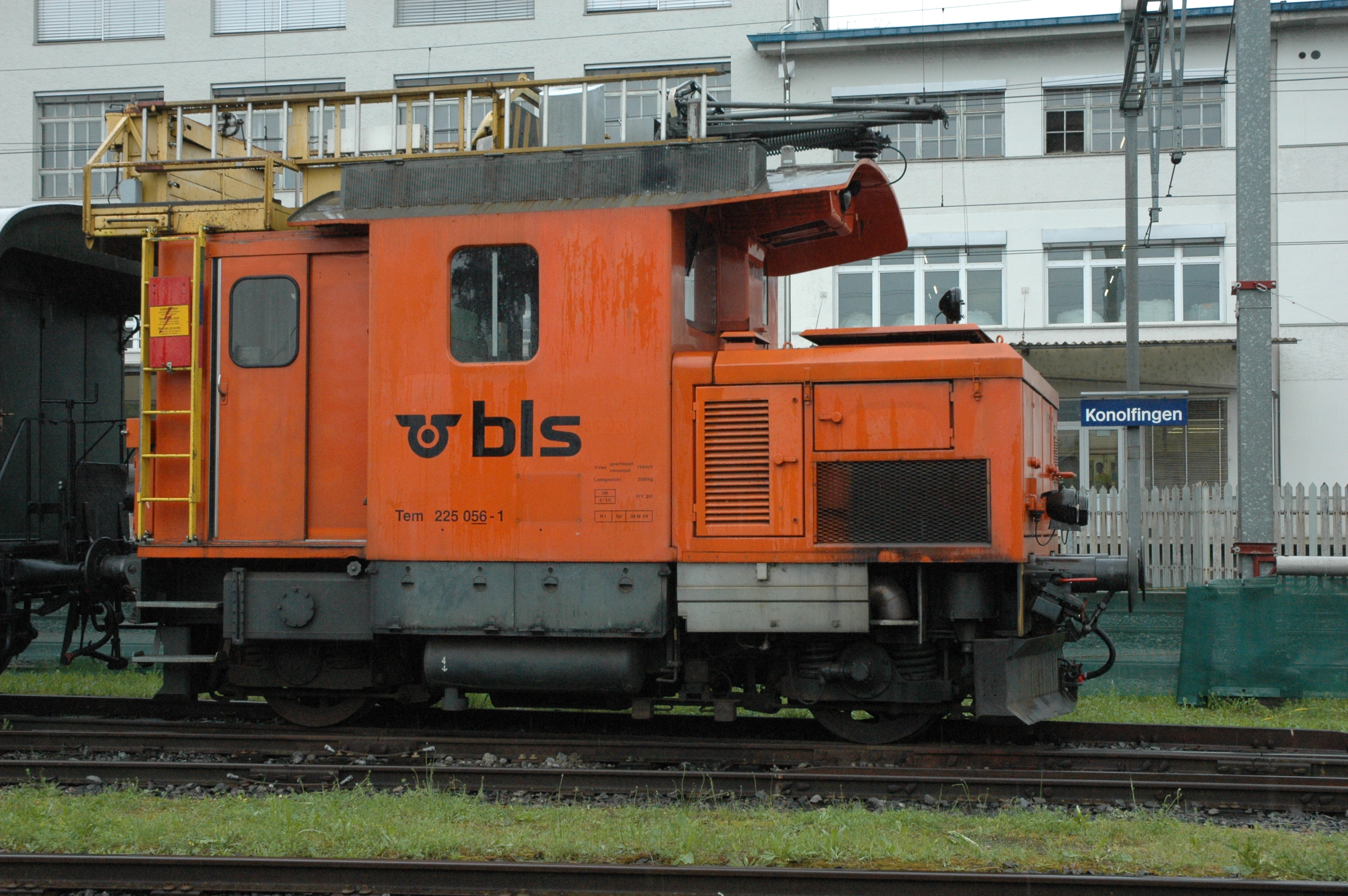 Traktor Tem 225 056 des Vereins Dampfbahn Bern, ex BLS, in Konolfingen (die noch sichtbaren Embleme der BLS AG sind inzwischen entfernt worden